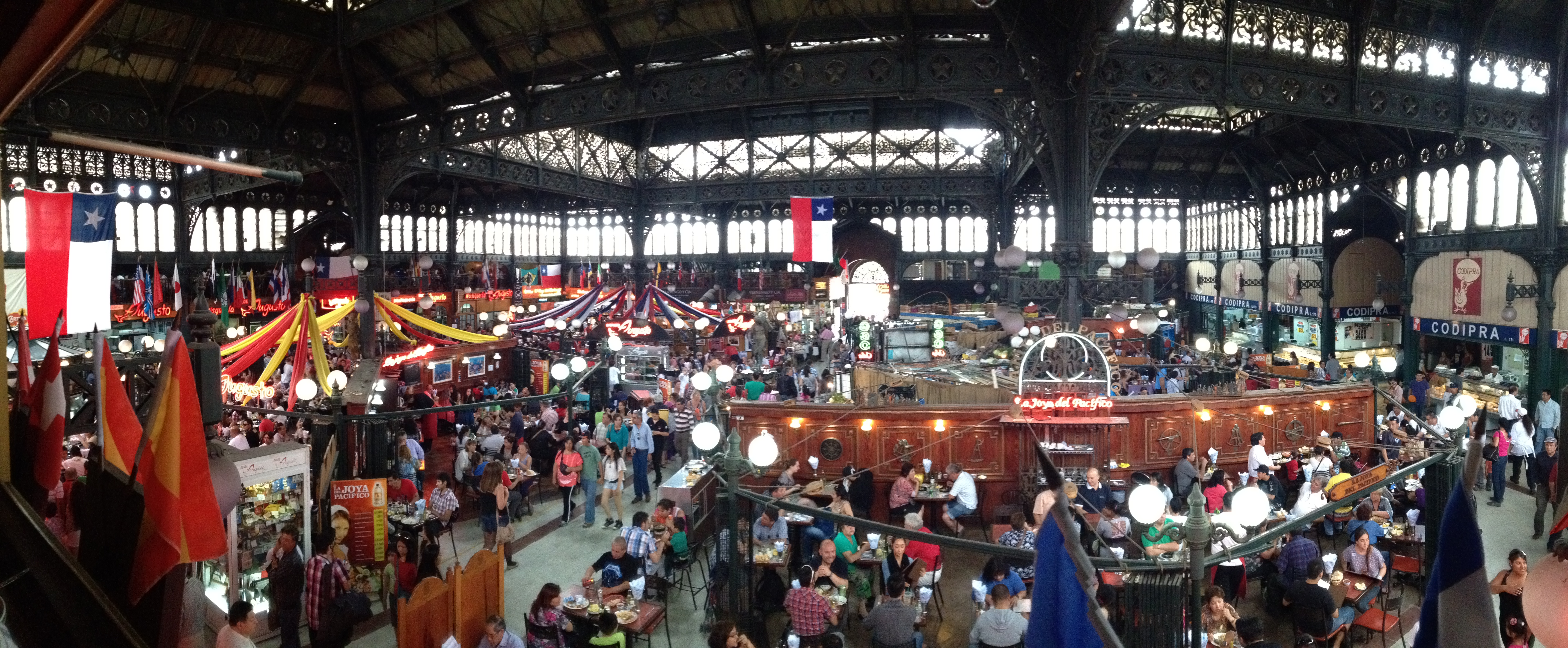 Mercado Central de Santiago (interior)